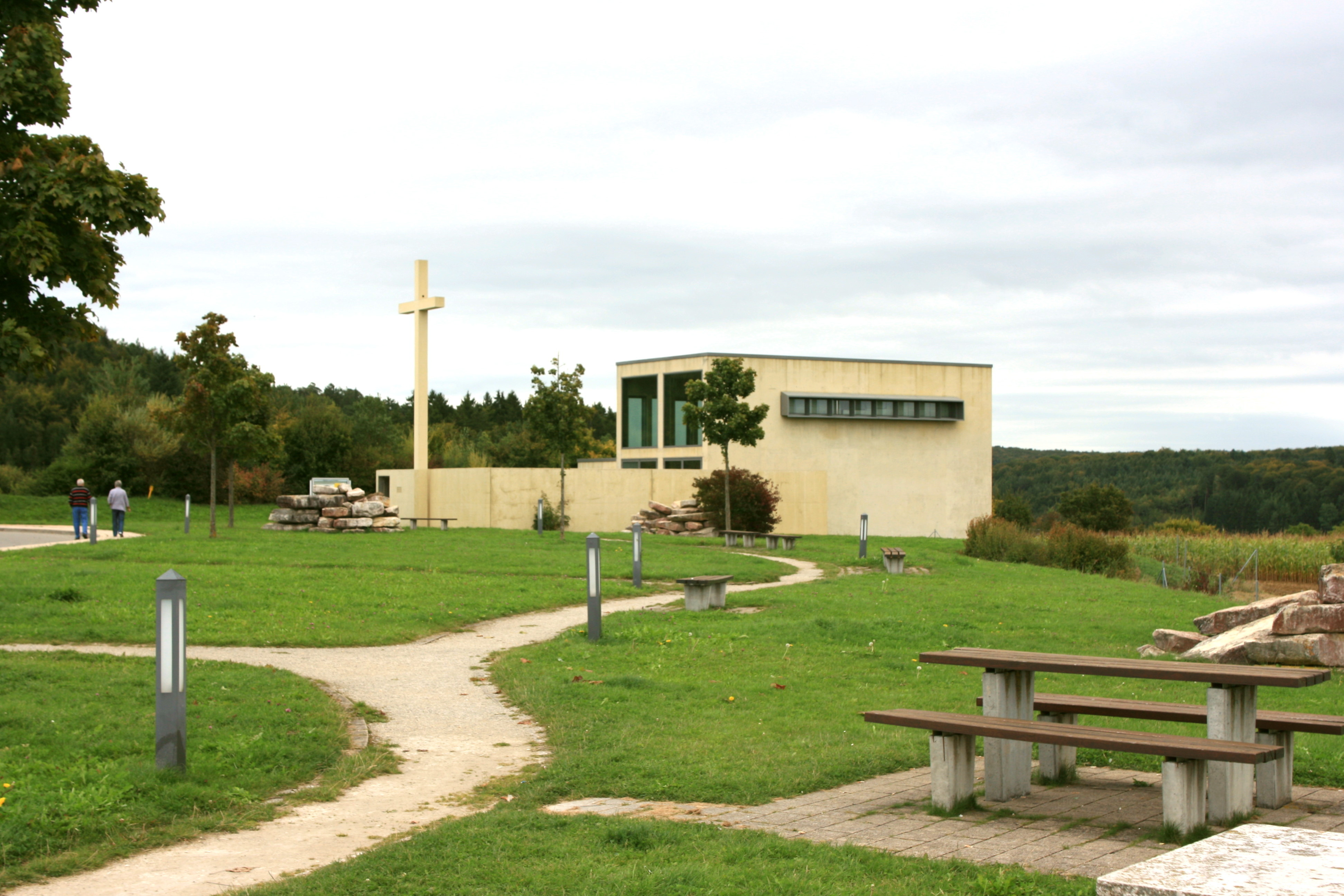 Autobahnkapelle Emmaus an der Raststätte Im Hegau West, BAB 81, Zur Engener Höhe in Engen